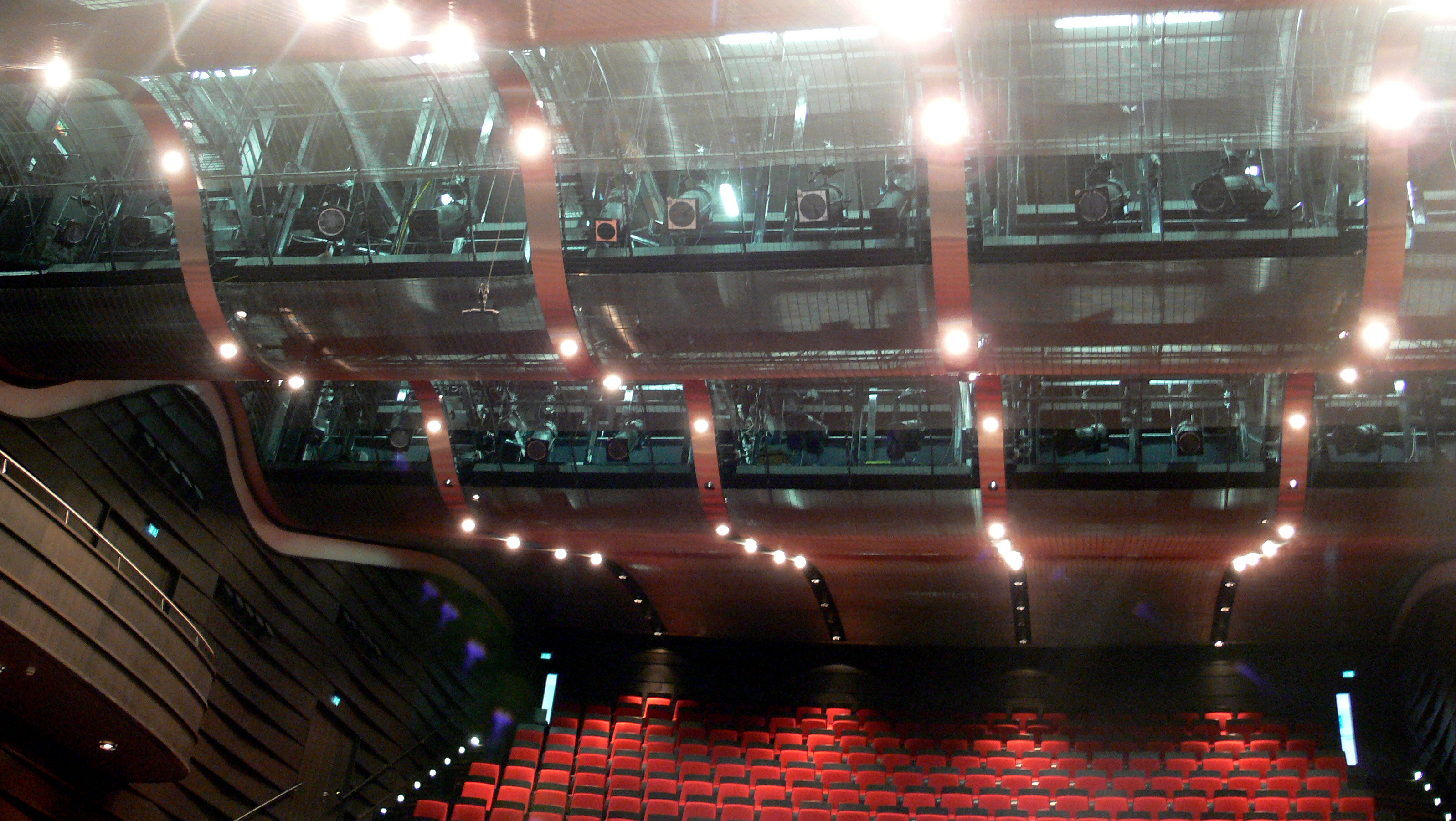 Theater Bielefeld, Bühnenbeleuchtung in der Decke des Zuschauerraums, von der Bühne aus gesehen